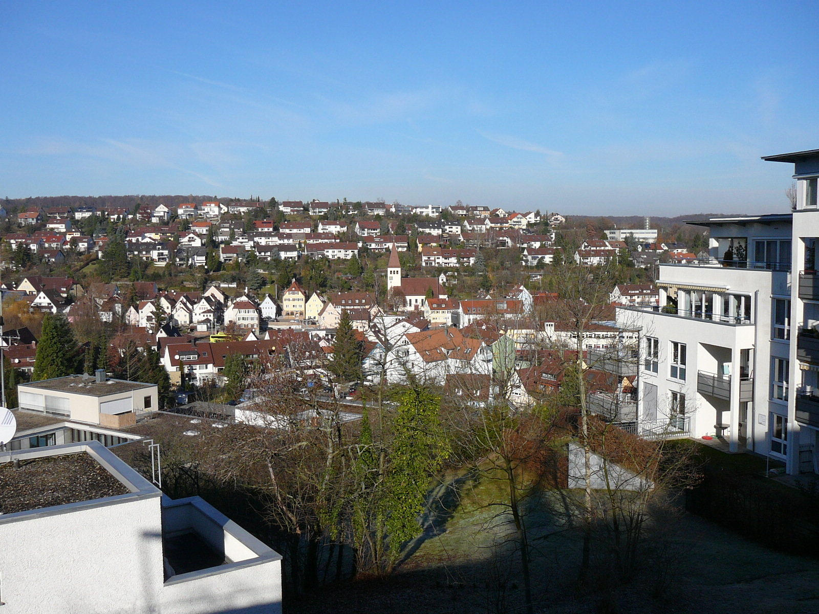 Botnang in Stuttgart, Baden-Württemberg, Germany. Seen from the west in automne.